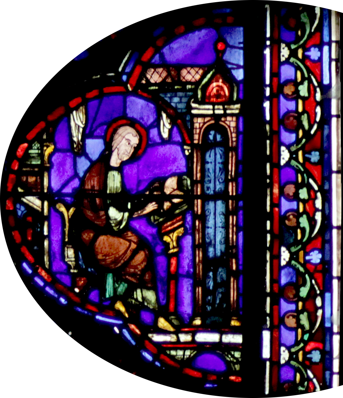 Excerpts from File:Vitrail Chartres-030-d rectifié.jpg